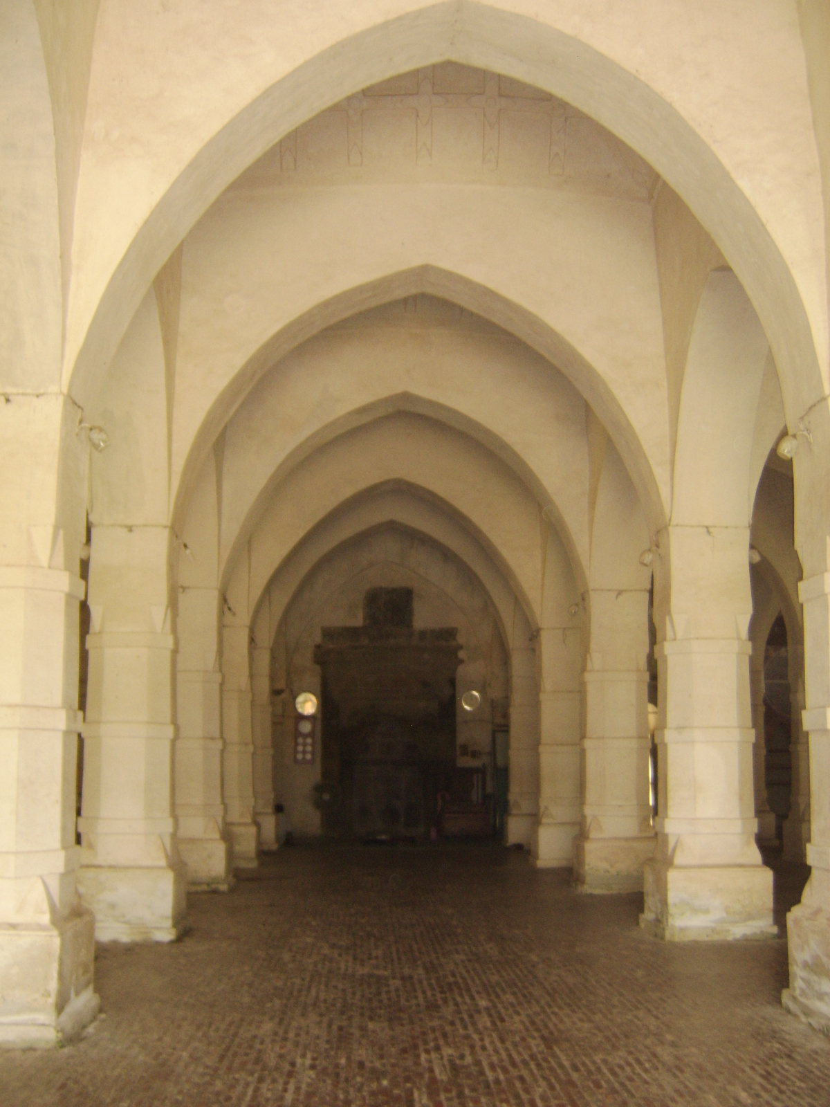 ষাট গম্বুজ মসজিদের ভিতরের দৃশ্য।